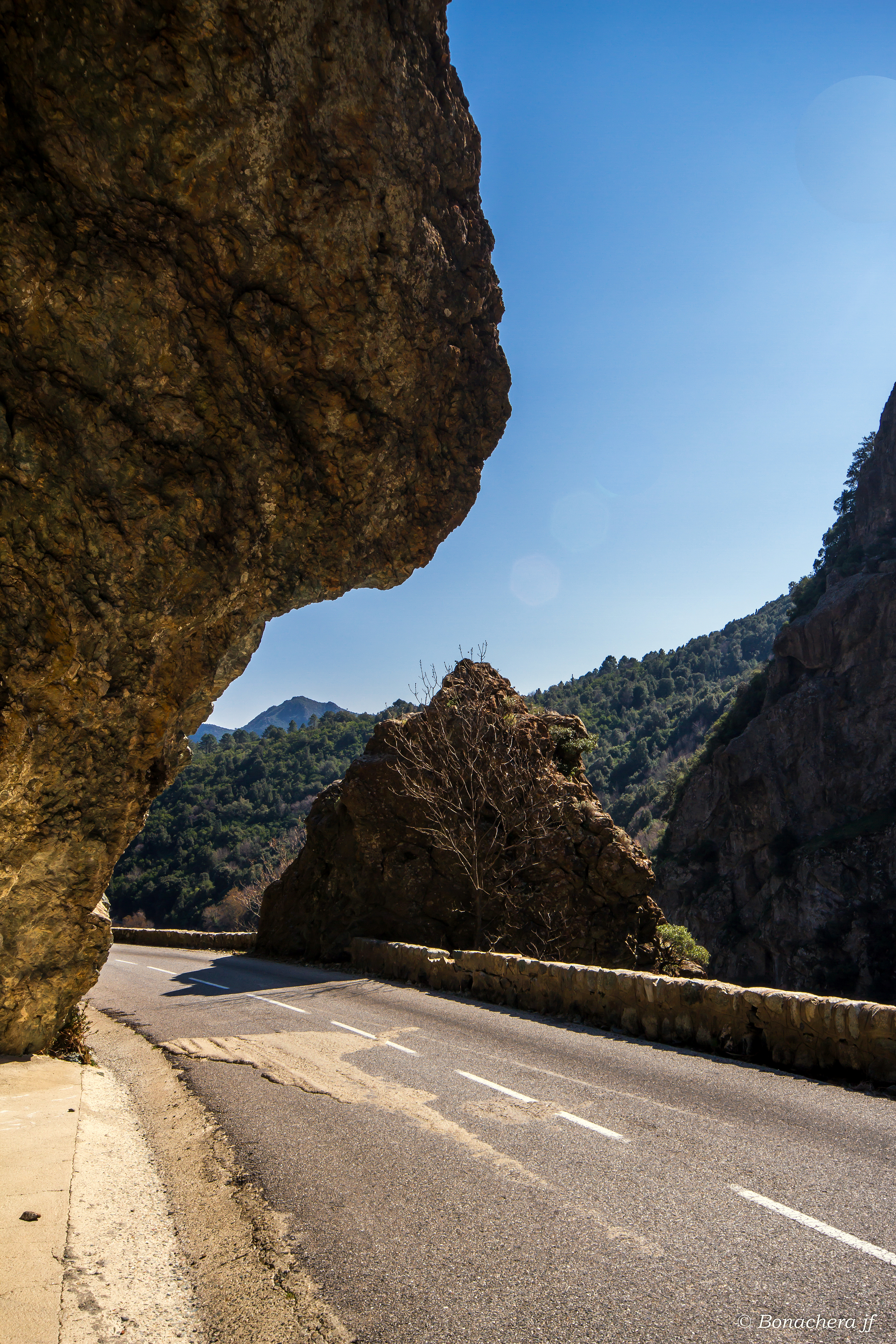 Une vue du défilé de l'inzecca, Ghisoni- Corse